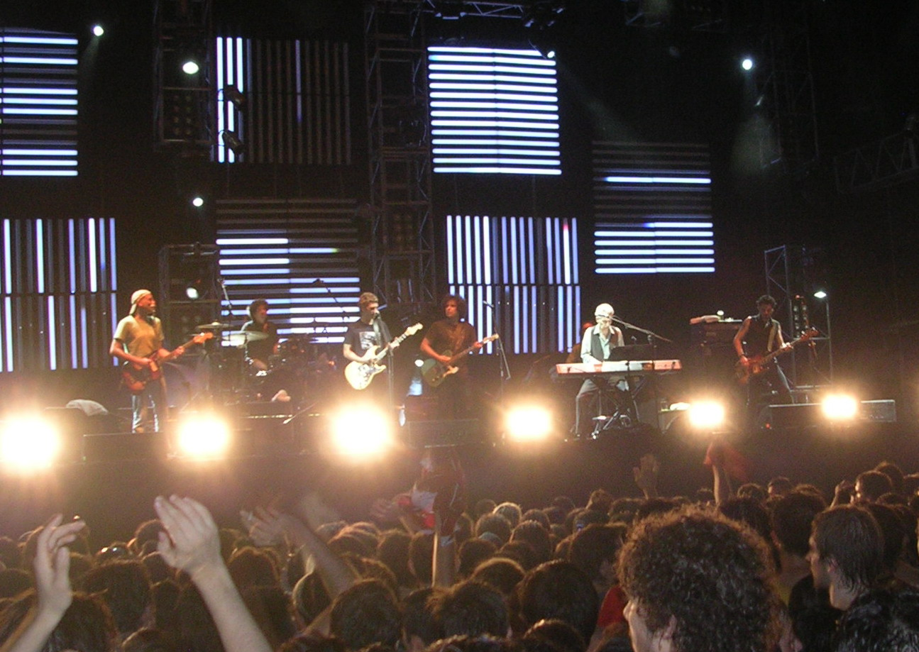 Calamaro y Rot en la gira 2 Rodriguez en Buenos Aires